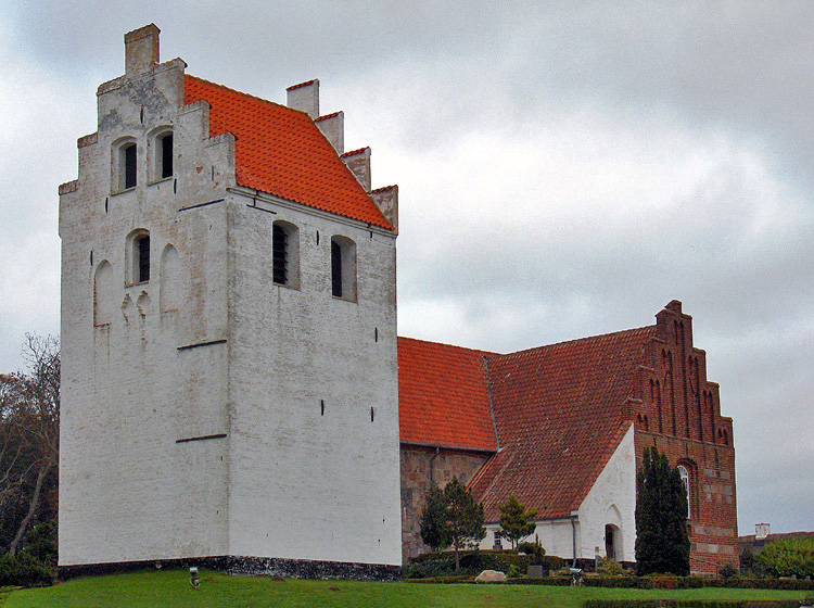 fra sydvest